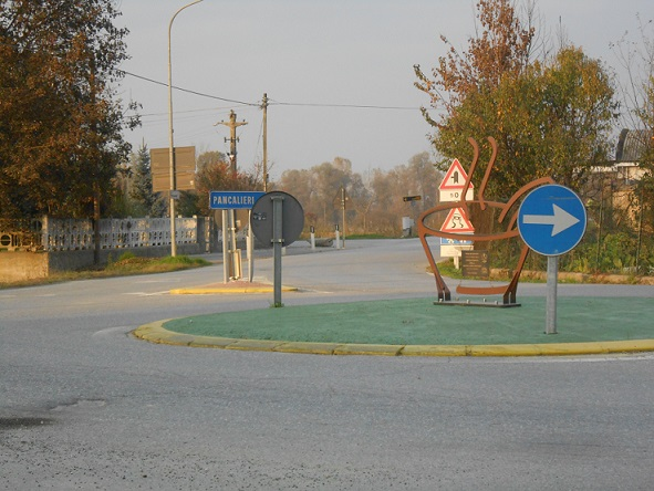 Piemontèis: Ròtonda ed Faule,col Fujot dla Bagna Caùda